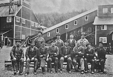 Lekombergs gruva, gruvarbetare